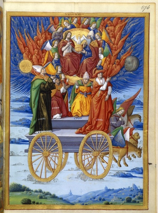 Français 594, fol. 376, Allégorie : Triomphe de la Divinité